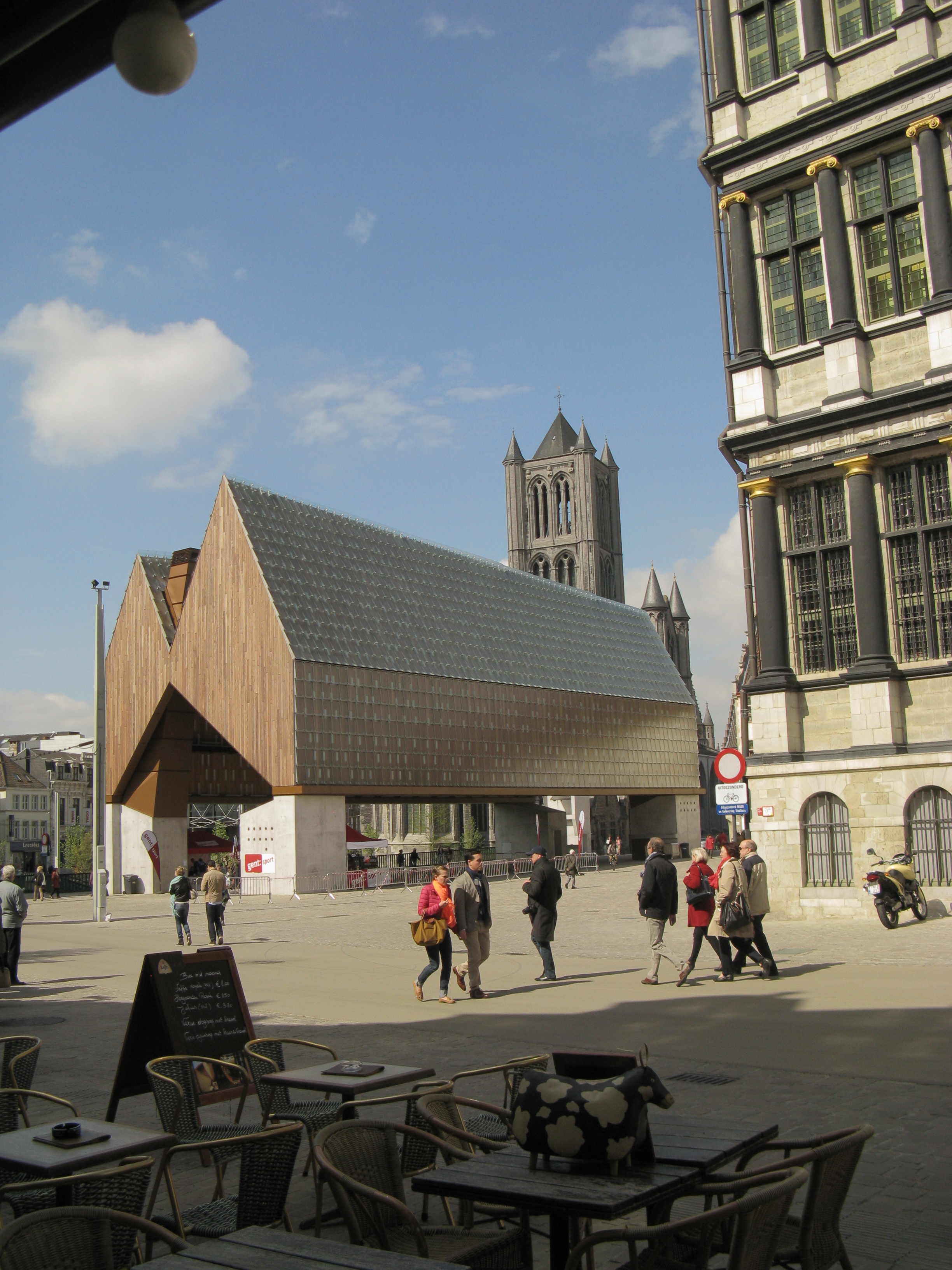 Emile Braunplein, Gent